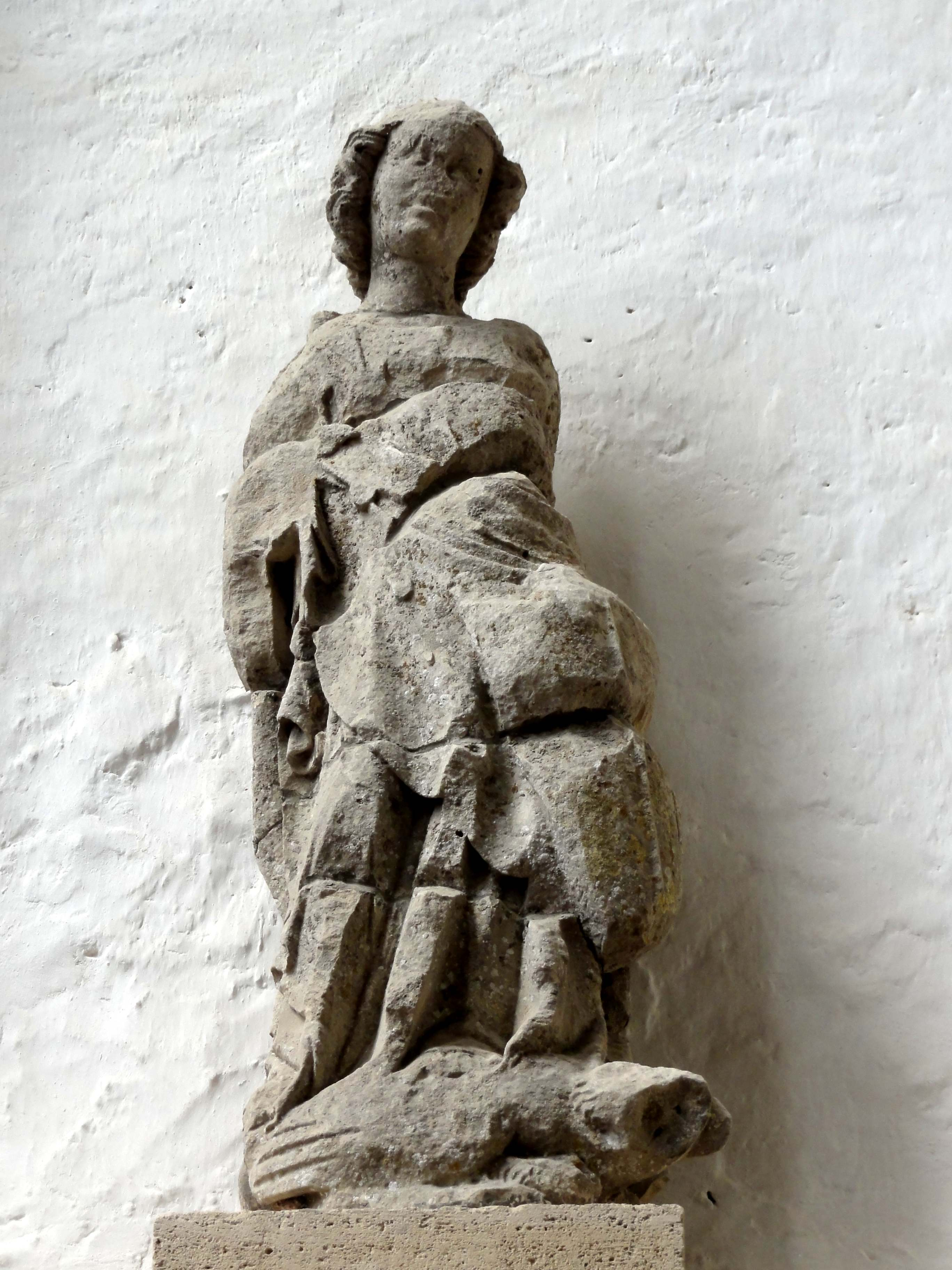 Mobilier de la basilique Saint-Mathurin de Larchant - voir titre.